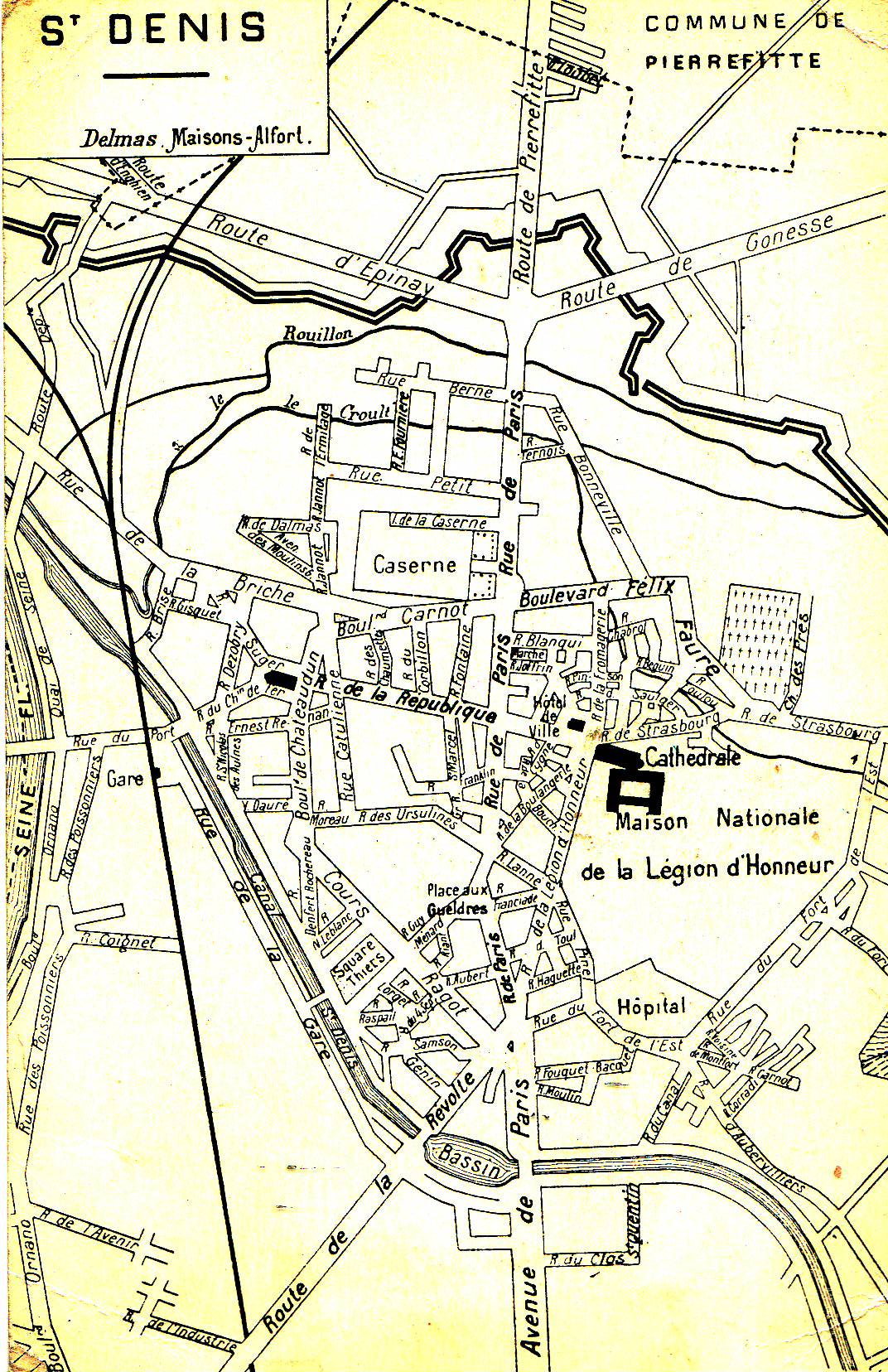 Carte postale ancienne éditée par Delmas à Maisons-AlfortCarte de livreur du centre et du nord de la ville de Saint-Denis (Seine-Saint-Denis).On y distingue également le cours du Canal Saint-Denis, du Croult et du Rouillon avant leur confluent dans la Seine